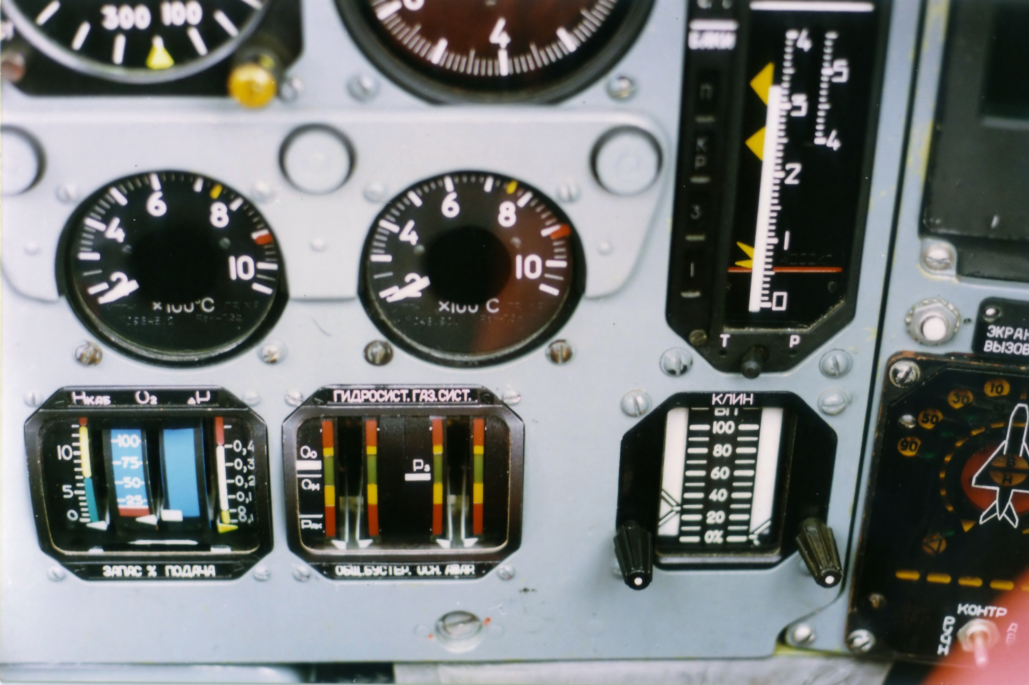 MiG-29 cockpit